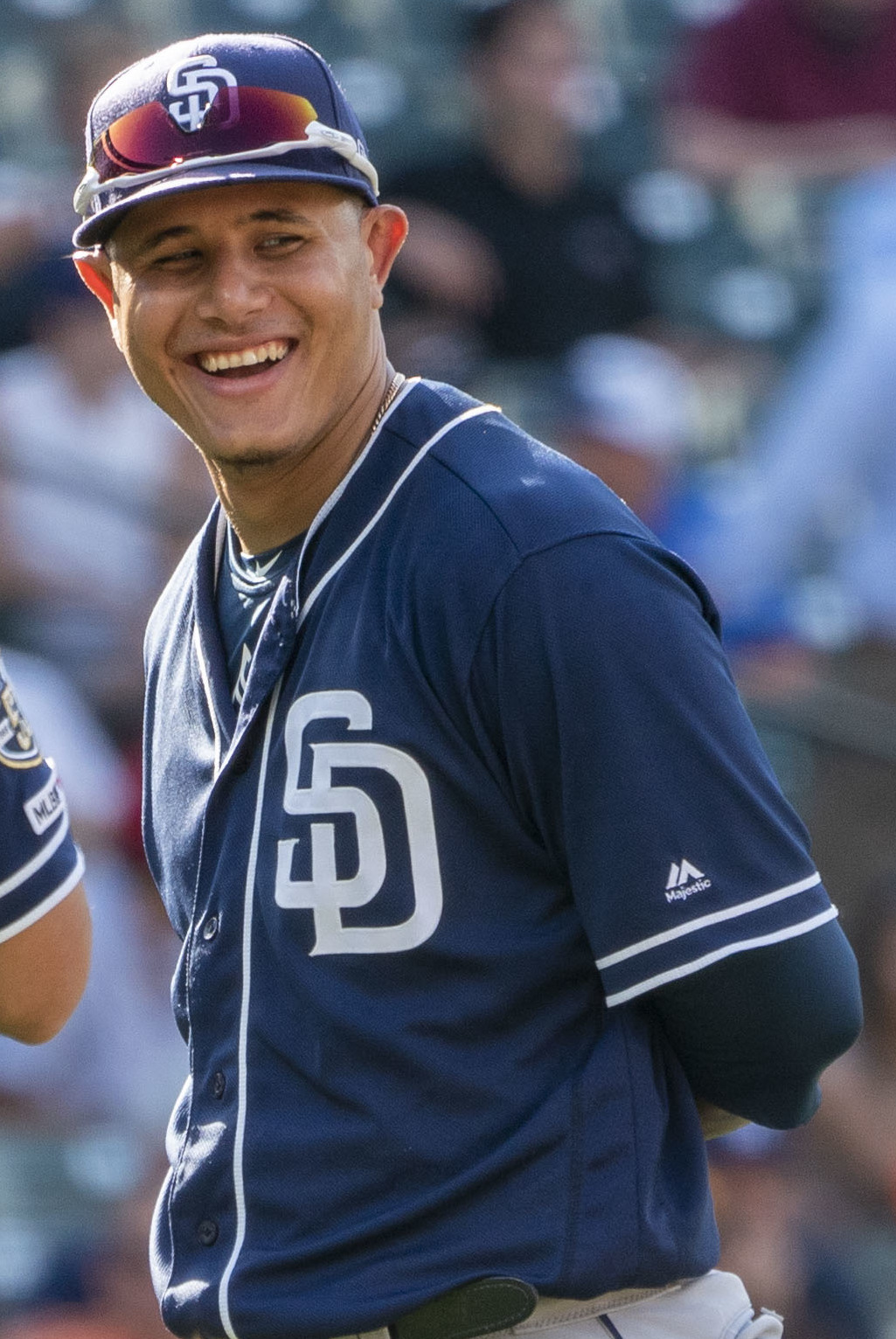 Padres at Orioles 6/26/19